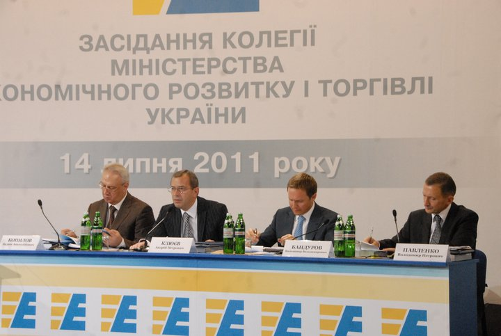 Заседании коллегии Министерства экономического развития и торговли Украины. 2011 год.